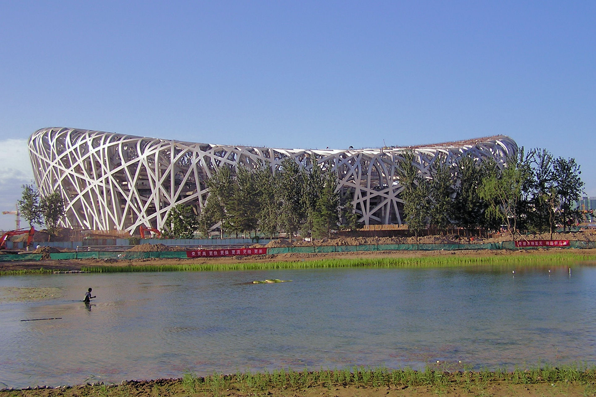 stade olympique de pékin lors de sa construction